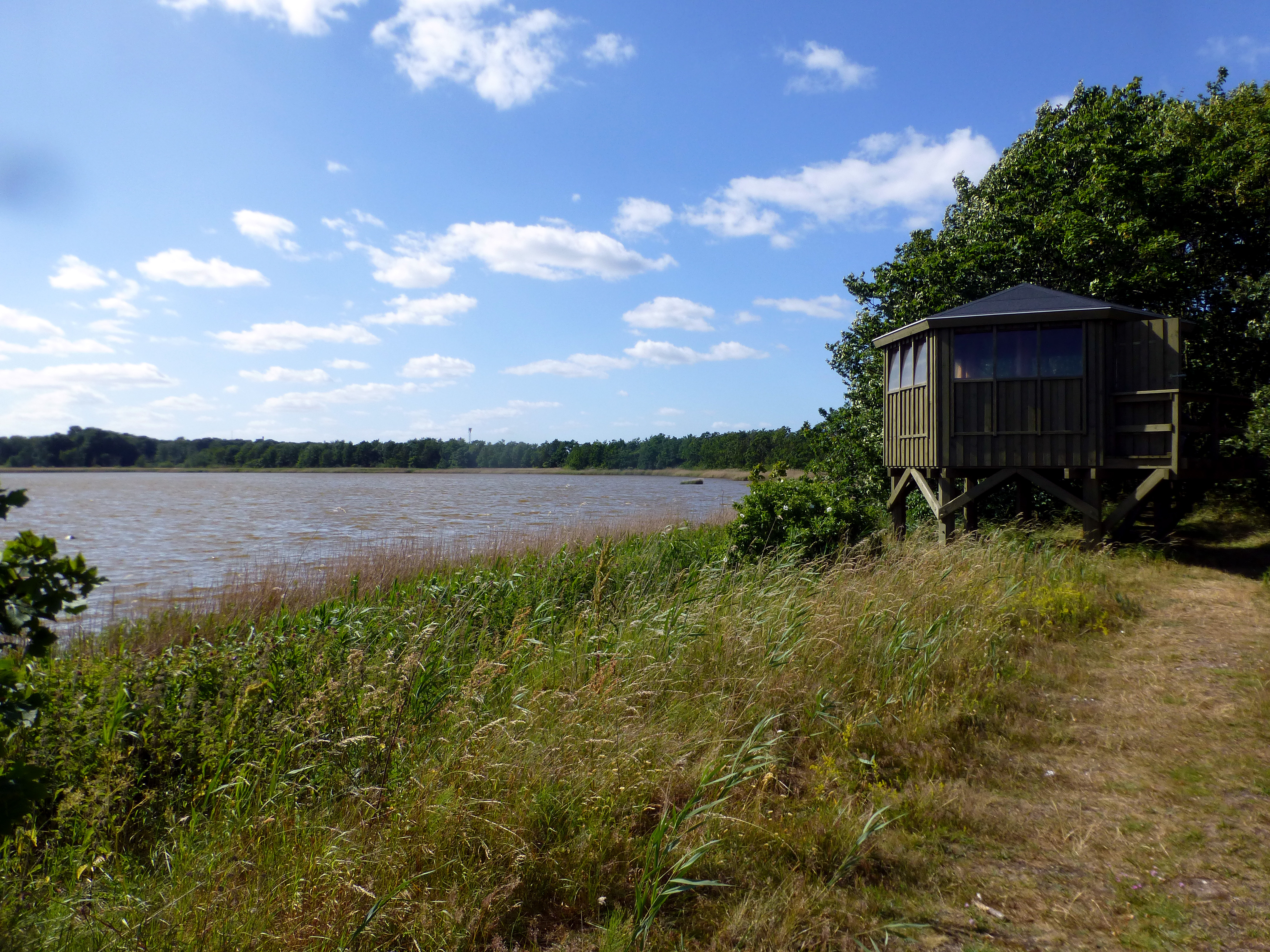 Fugletårn ved Østerø , Knudshoved, set mod nordvest